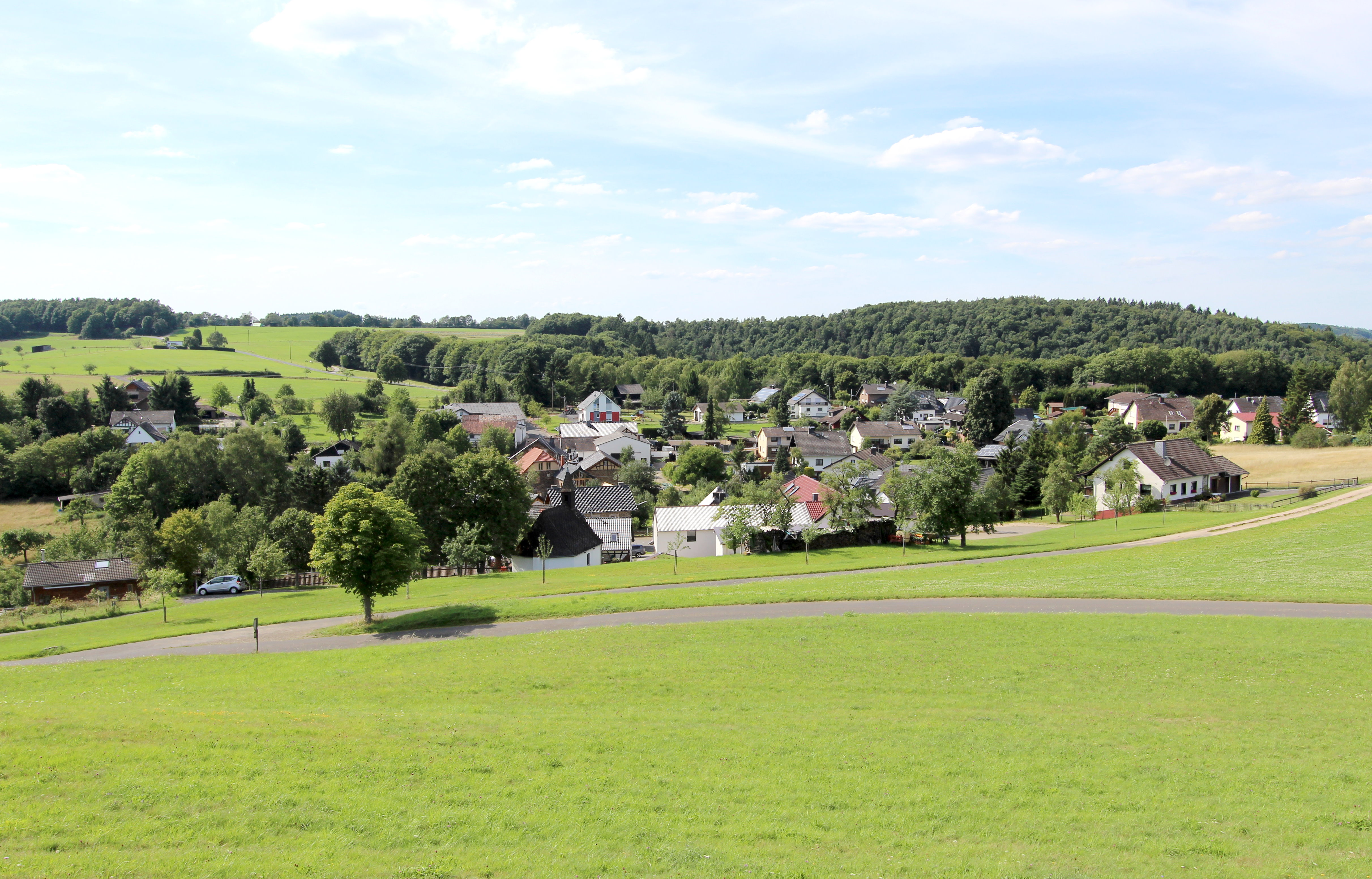 Sierscheid, östlich vom Ort. Aufnahme von 2017.